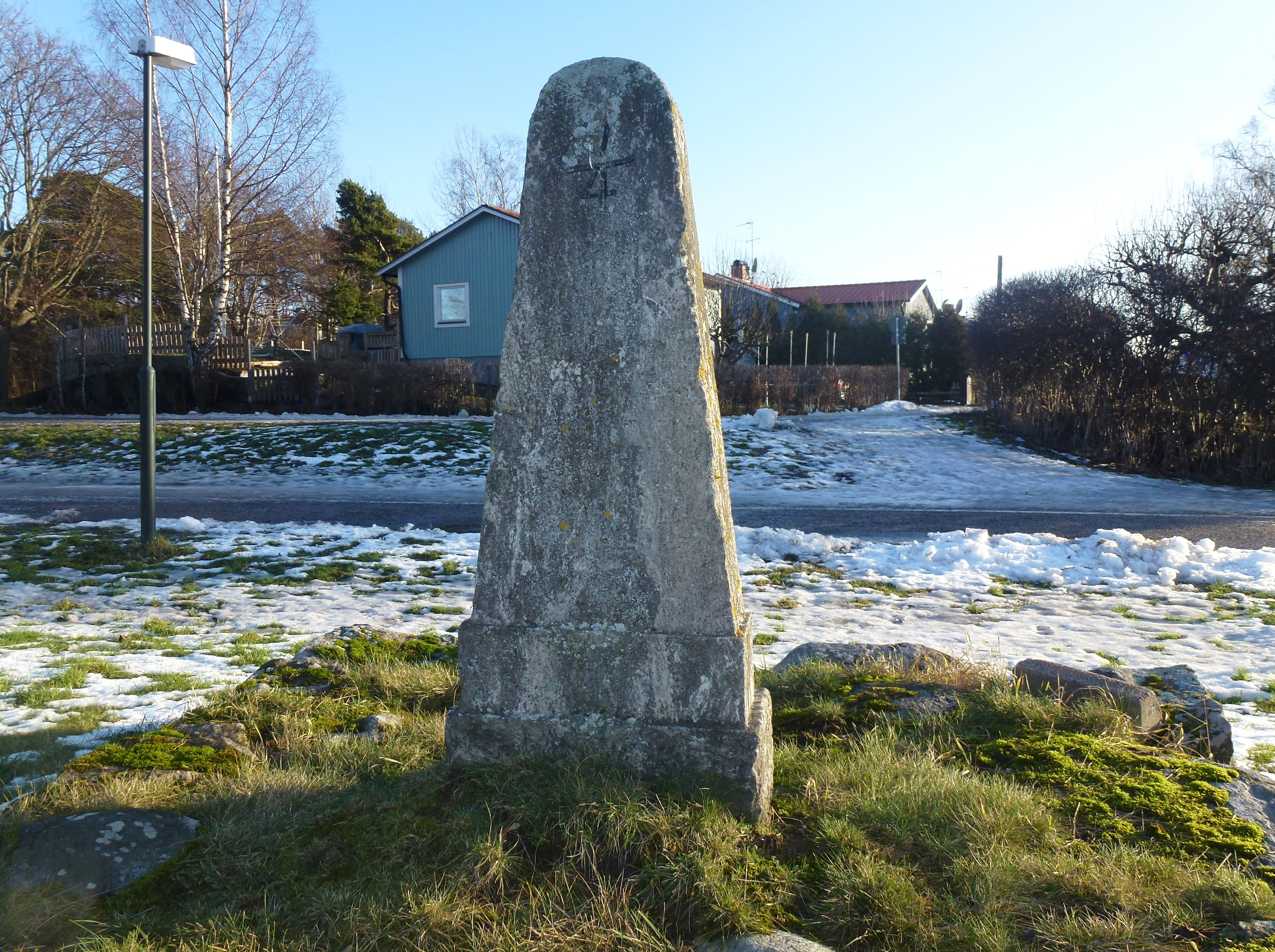 Milsten vid Mickelsbergsvägen